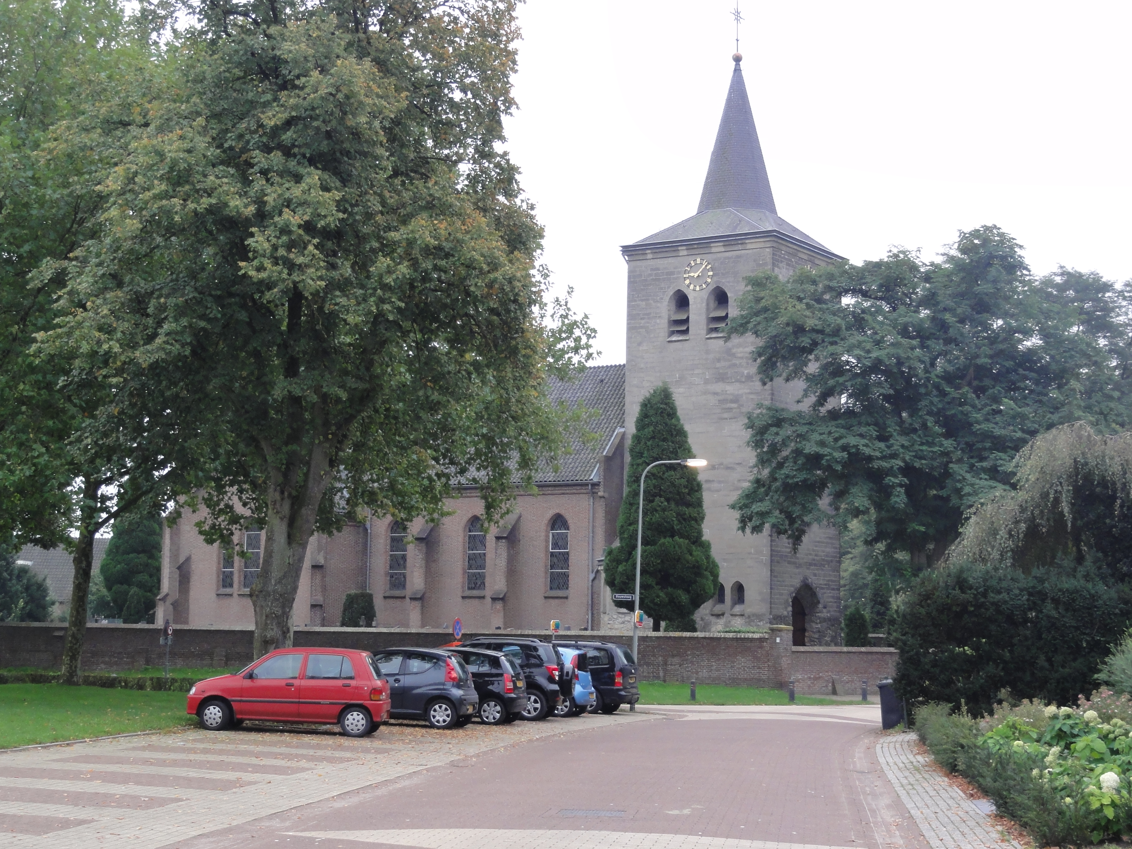 Heumen Rijksmonument 30071 Lambertuskerk 87″ N, 5° 54′ 54.76″ E